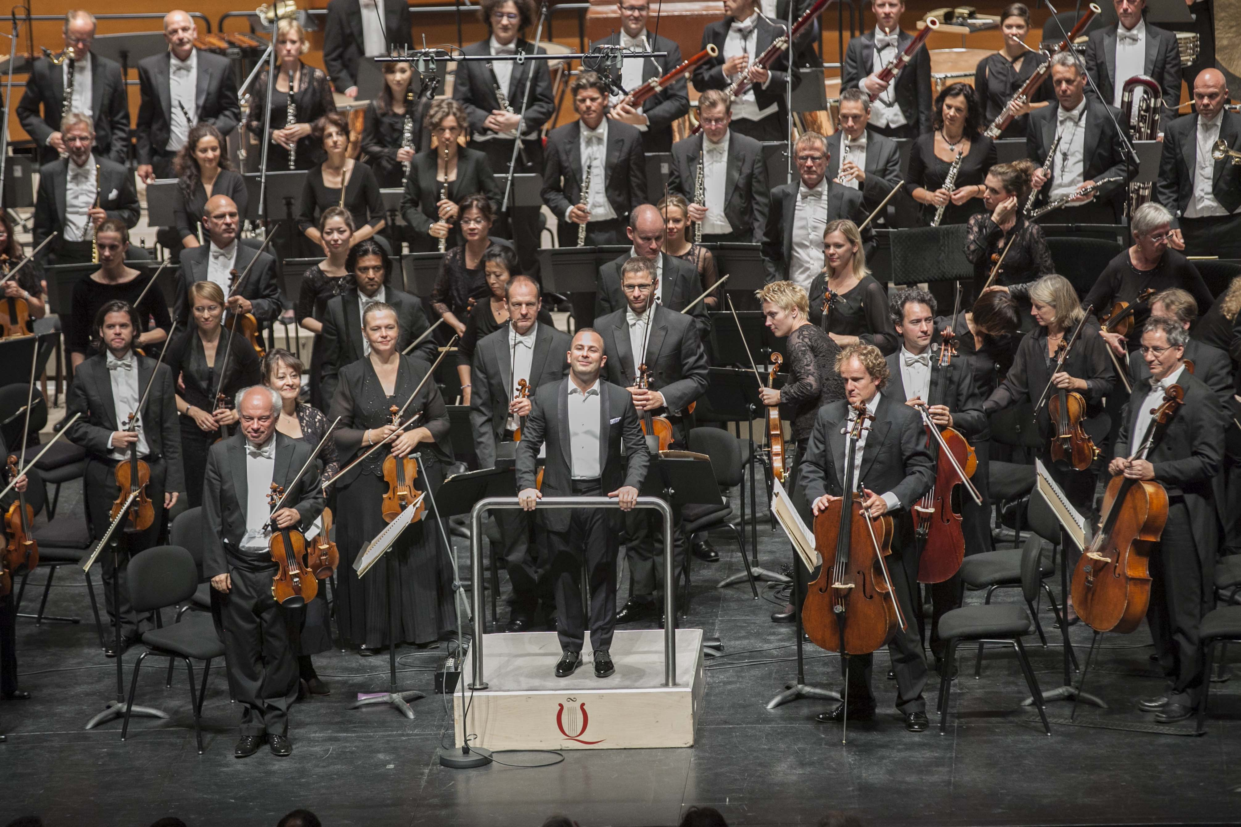 © Quincena Musical- Iñigo Ibáñez